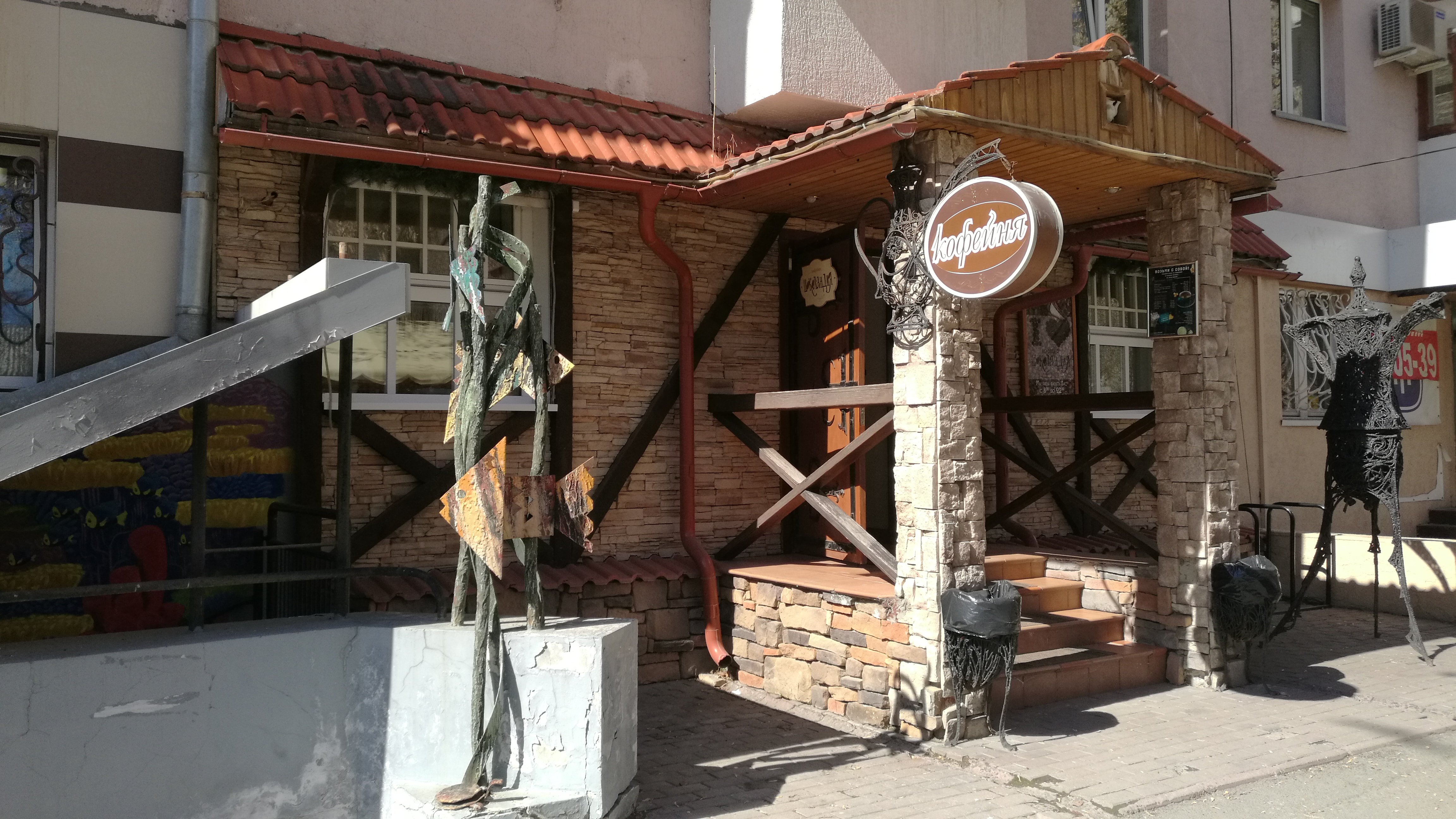 Kafejo Ŝokoladnica. Tjumeno, Rusio.